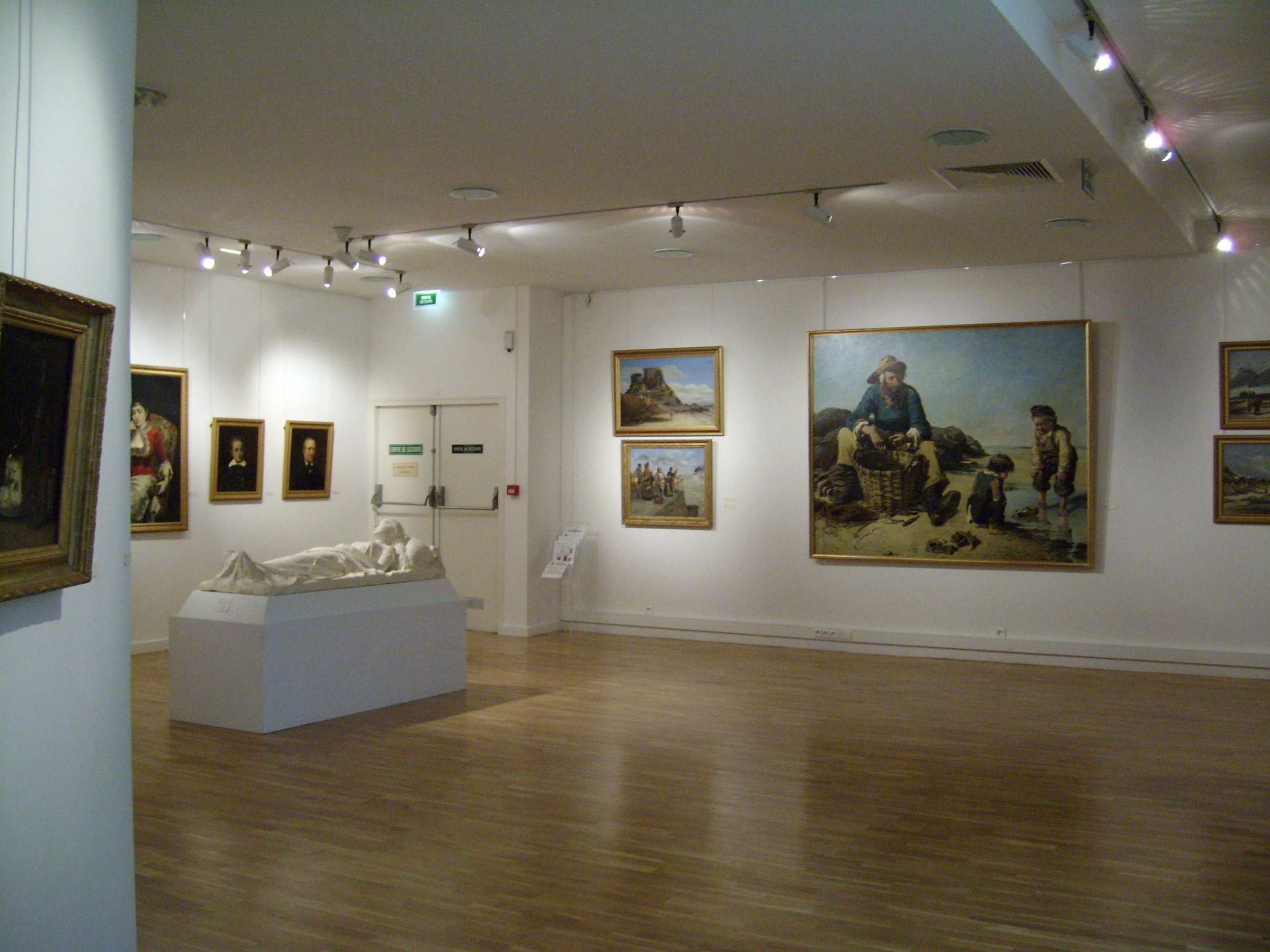 Guillaume Fouace, Musée Thomas-Henry, Cherbourg-Octeville